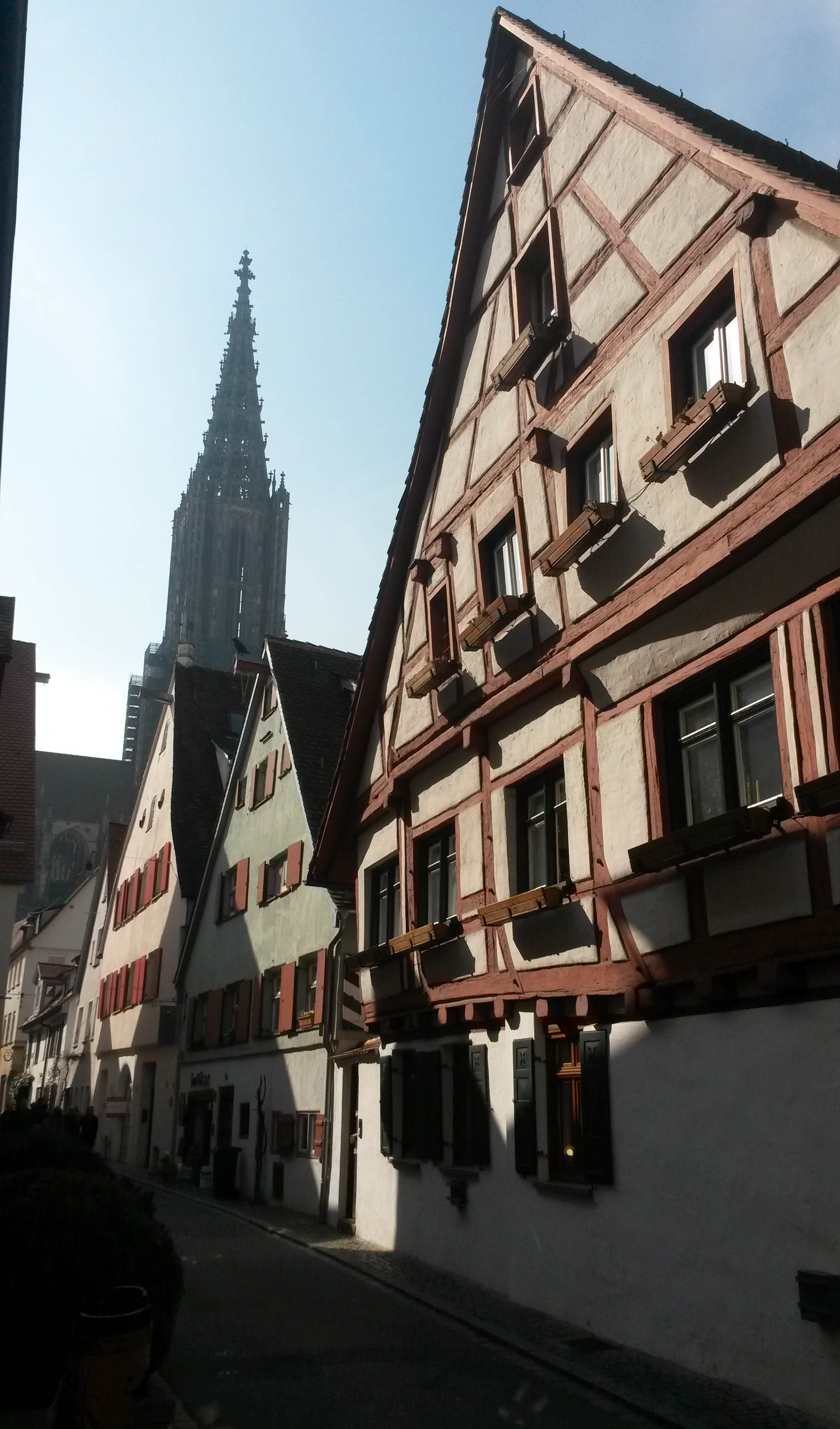 Rabengasse in Ulm mit Blick auf Münsterturm